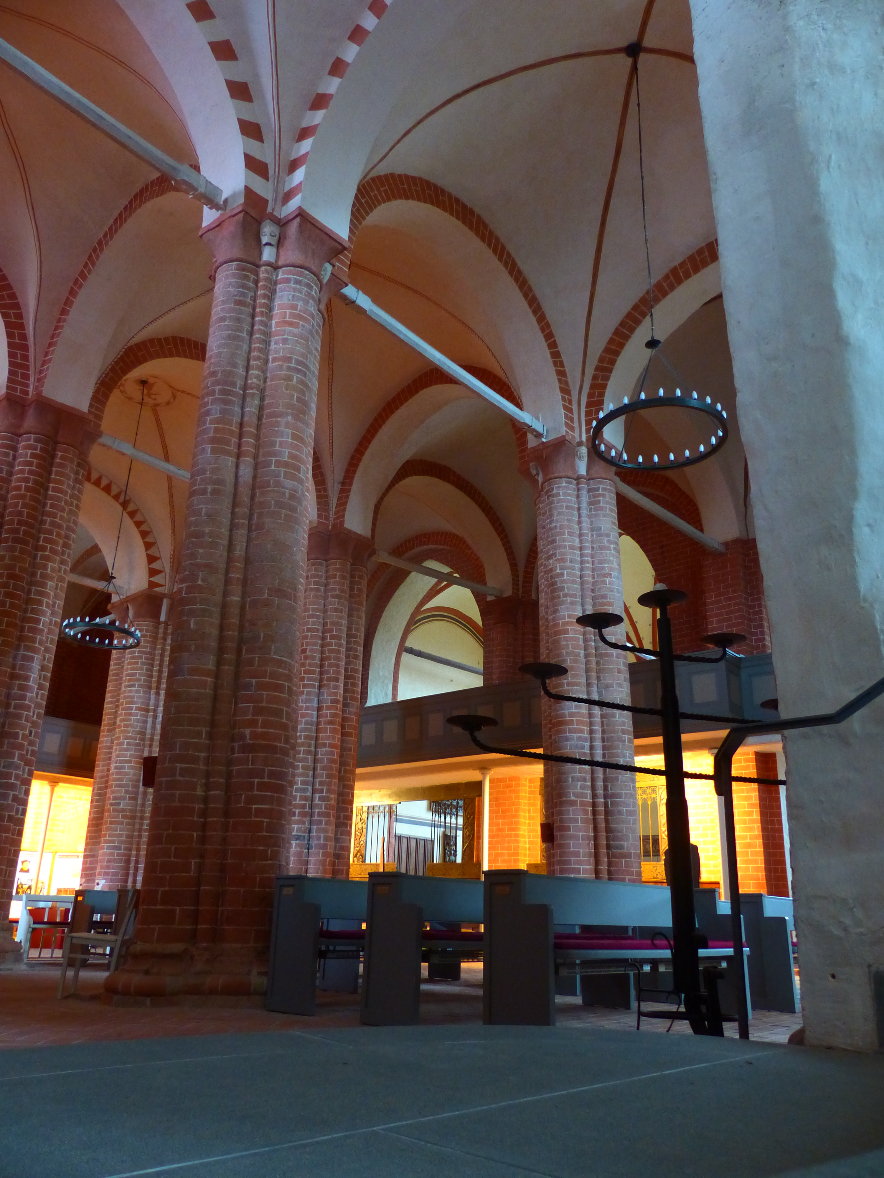 Die Stadtkirche St. Jakob und St. Dionysius Gadebusch ist die älteste Hallenkirche zwischen Elbe und Oder